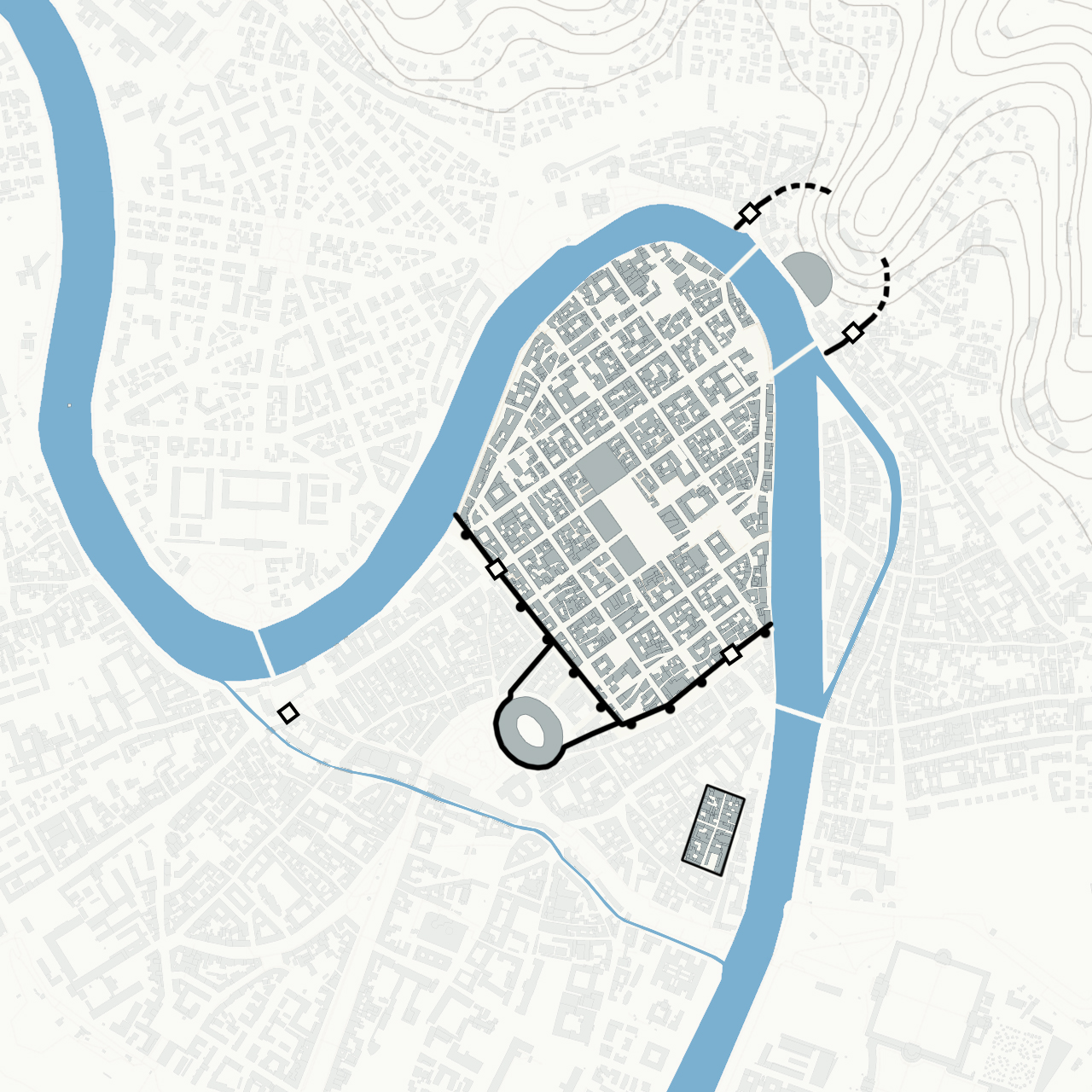 Planimetria della città di Verona con le mura e le porte urbiche principali. Vedi anche Le mura di Verona di Annamaria Conforti Calcagni.